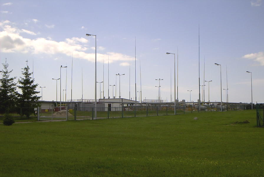 Dawna kopalnia ropy naftowej w Krzywopłotach autor zdjęcia Kluka; 02.02.200r.